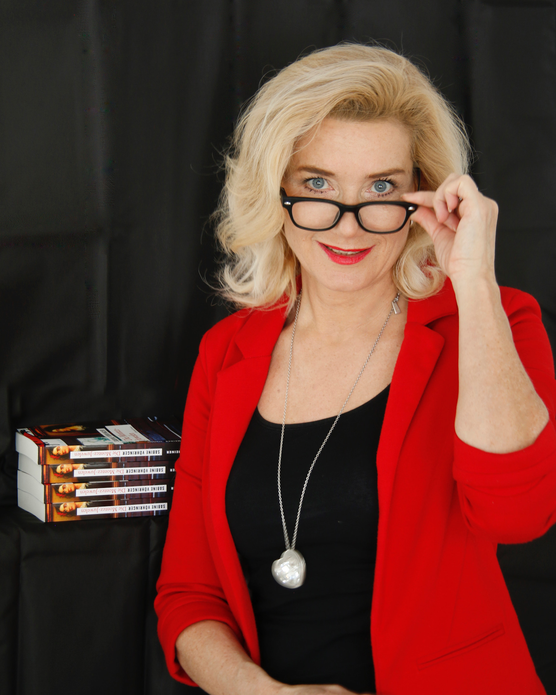 Sabine Vöhringer, Krimiautorin